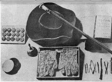 Hut von Kant